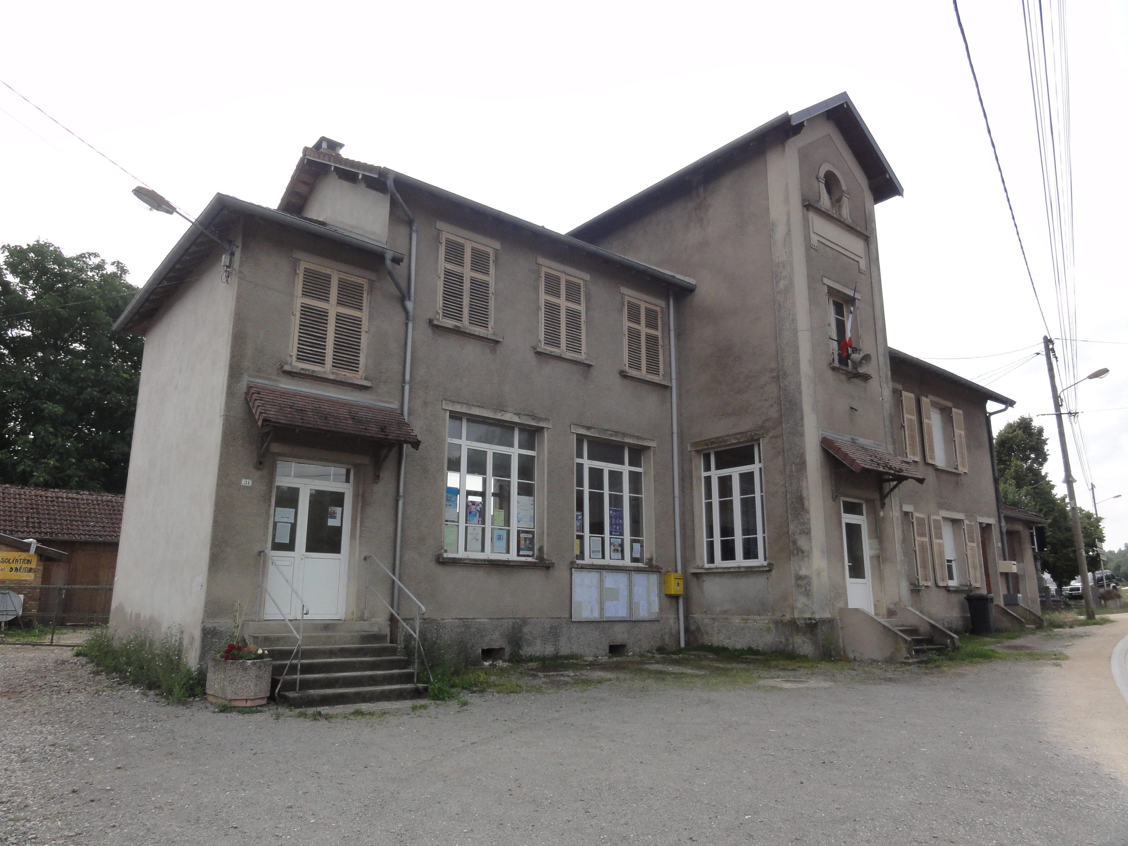 Saint-Remy-la-Calonne (Meuse) mairie